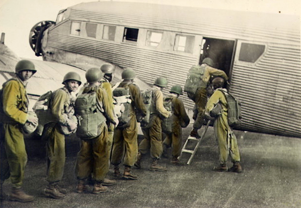 Pau, début 1946. Entrainement du bataillon de Choc. Certains anciens, brevetés par les américains, passent le brevet Français (à noter les différents types de casques). L'avion est un Junker allemand (prise de guerre). Collection Henri Simorre. Photo colorisé par le Mr Simorre. Autorisation de publier la photographie via le site (Cf.